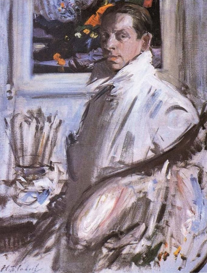 Self-portrait